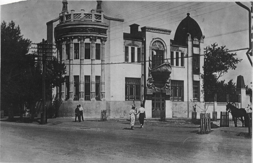 Особняк Сергея Александровича Стерлядкина, выстроенный в 1914 г. по проекту сызранского архитектора С. П. Щербакова в стиле модерн. (Фото 1937г. когда в нем располагалось хирургическое отделение поликлиники)